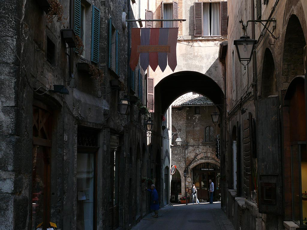 Spoleto: Via dei Duchi